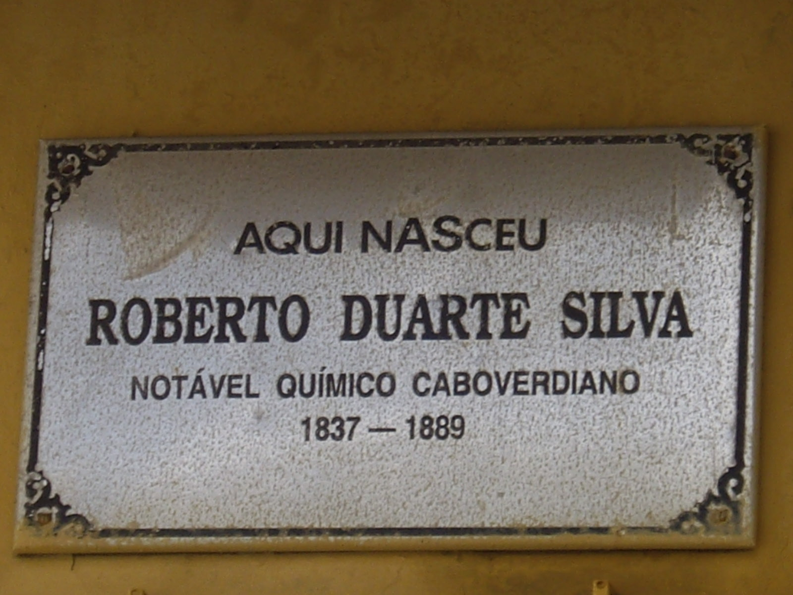 Aqui nasceu Roberto Duarte Silva Fotografía tomada en la isla de Santo Antao